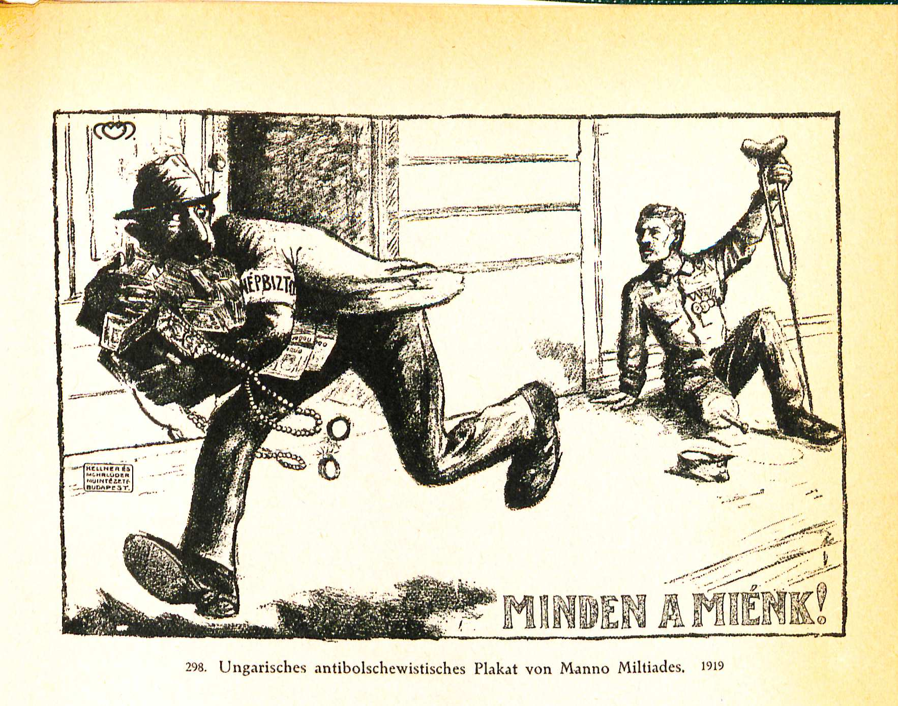 Miltiades Manno Plakat 1919. Minden a miénk!. (népbiztos= Volkskommissar)